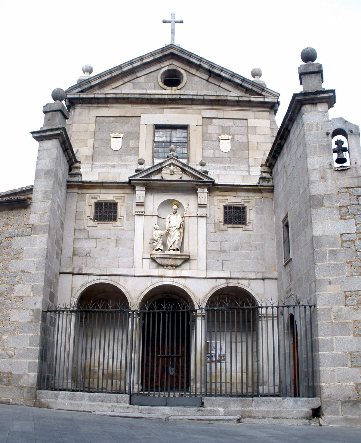 Avila - Convento de San Jose o de las Madres